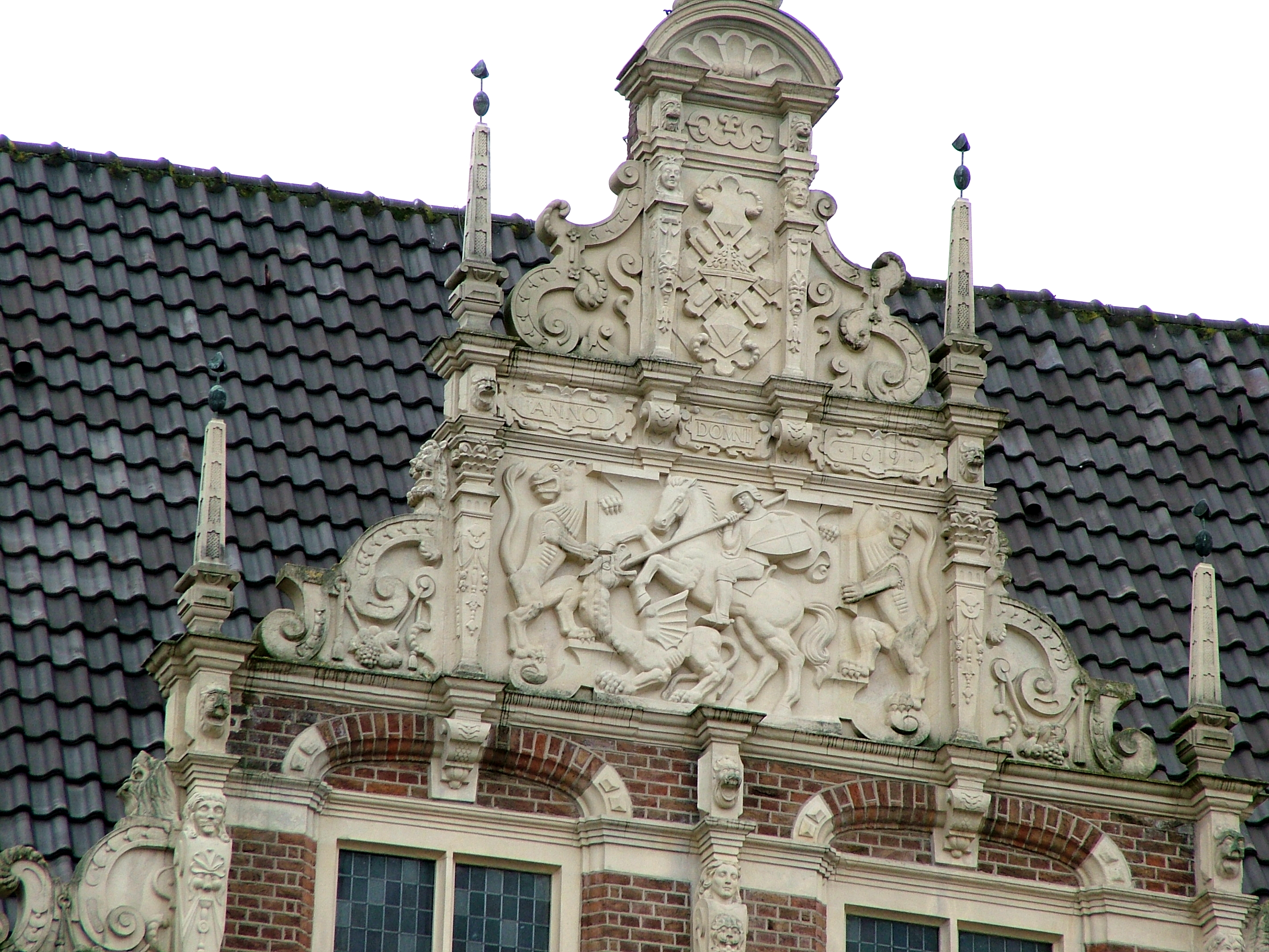 Bocholt, Giebel Rathaus